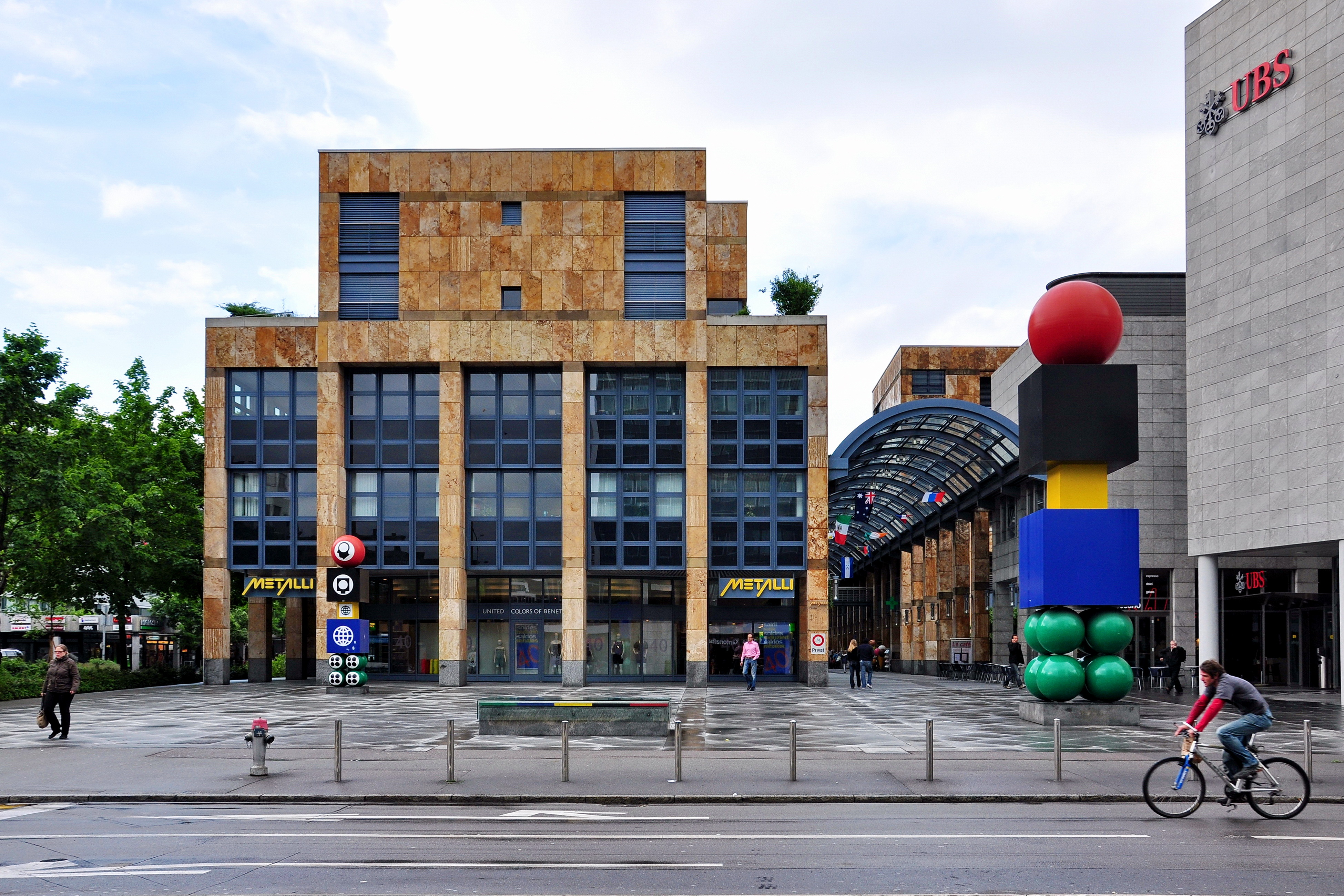 Metalli in Zug (Switzerland)